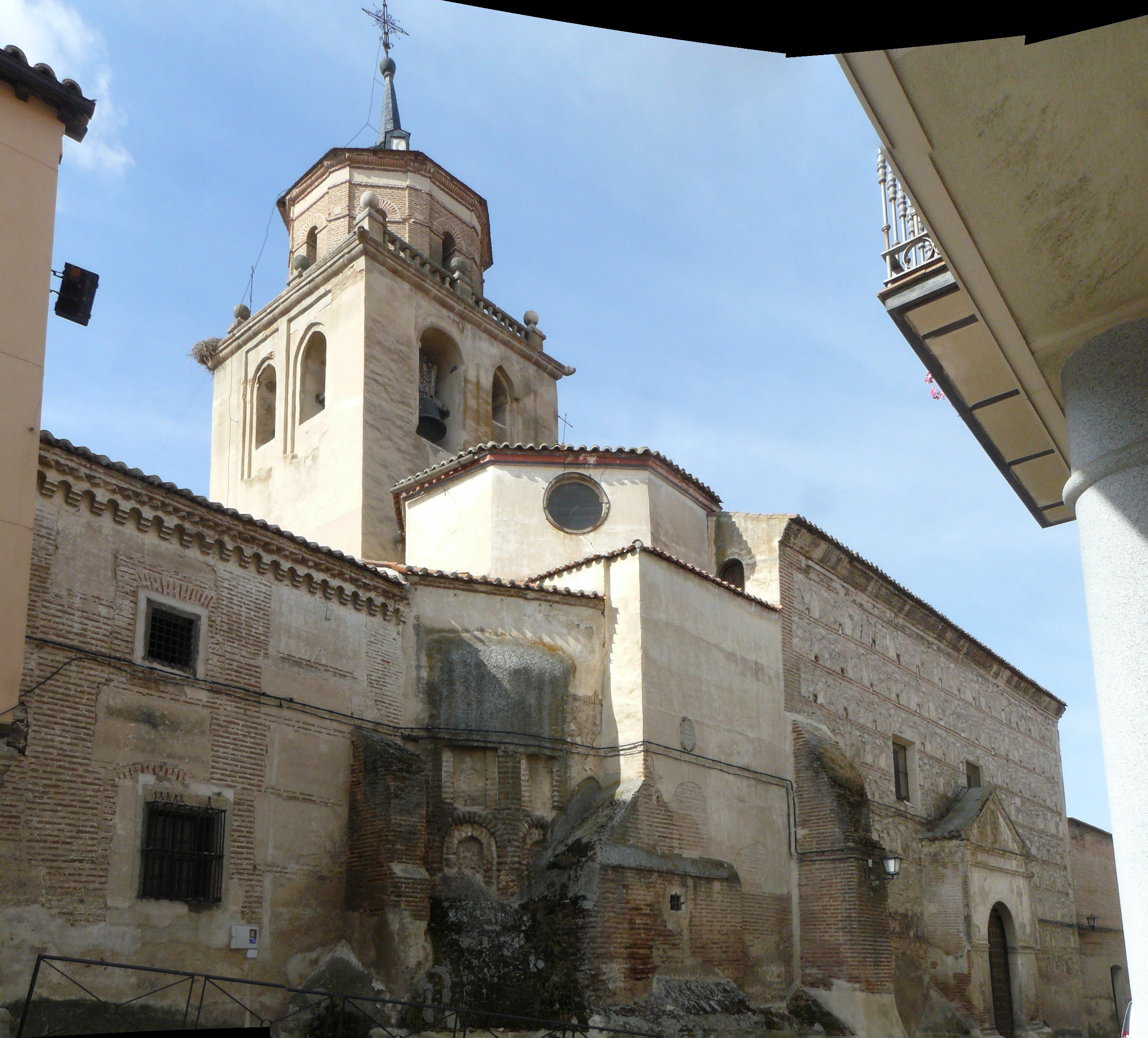 Iglesia de San Juan Bautista, Arévalo, Ávila.